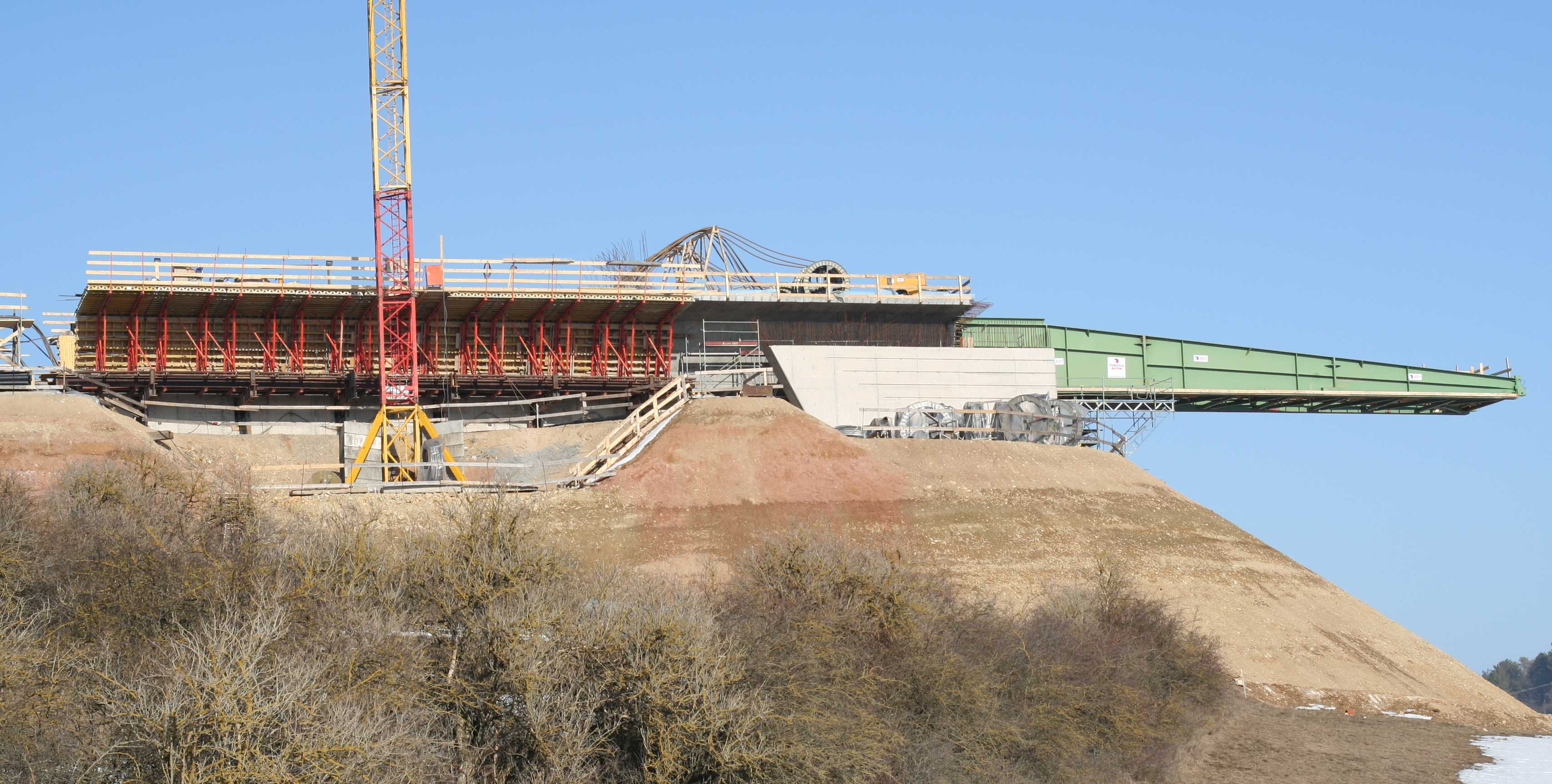 Taktanlage der Talbrücke Waisa, A73 zwischen Eisfeld und Brünn